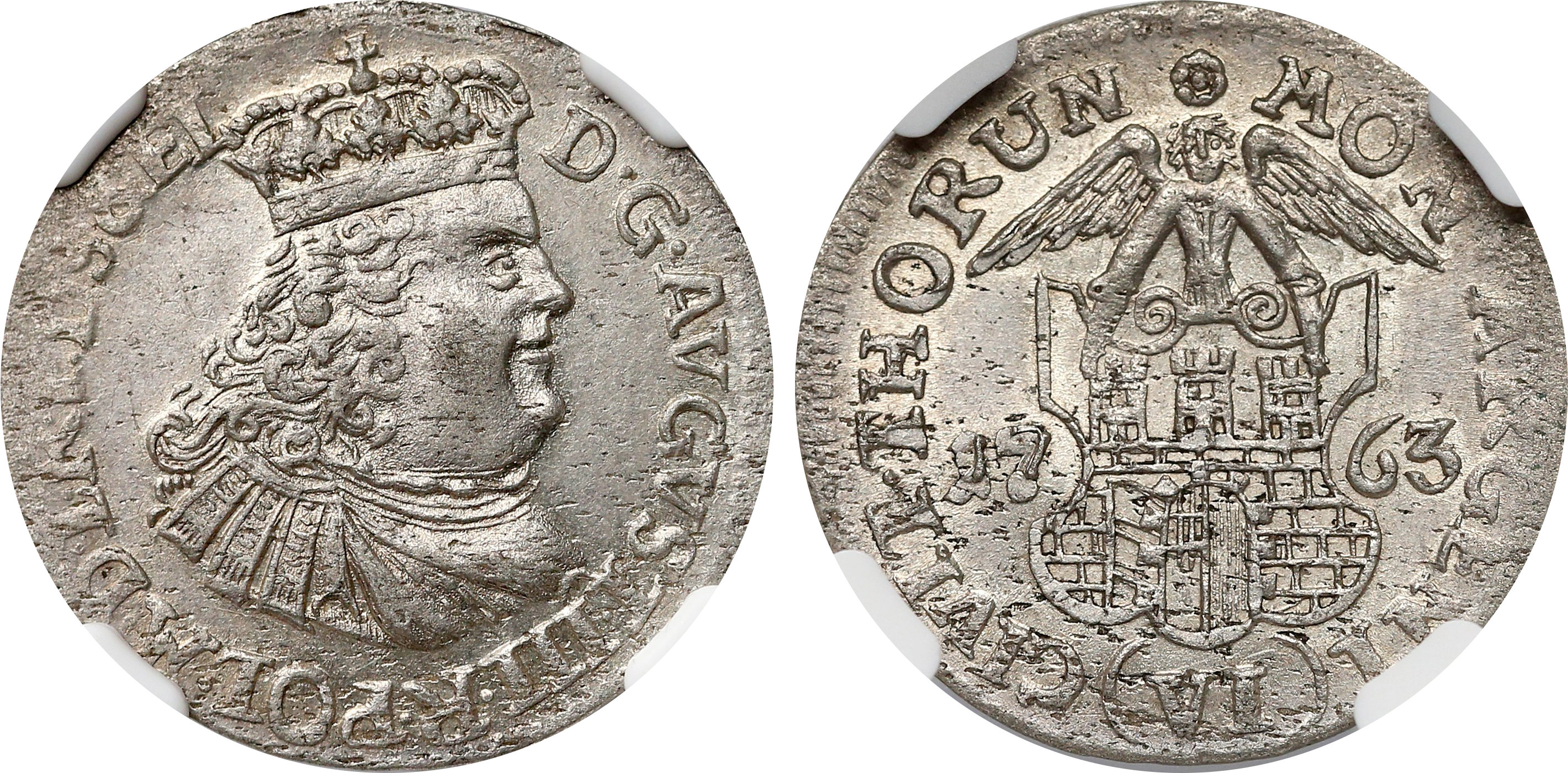 Szóstak miejski Toruń 1763